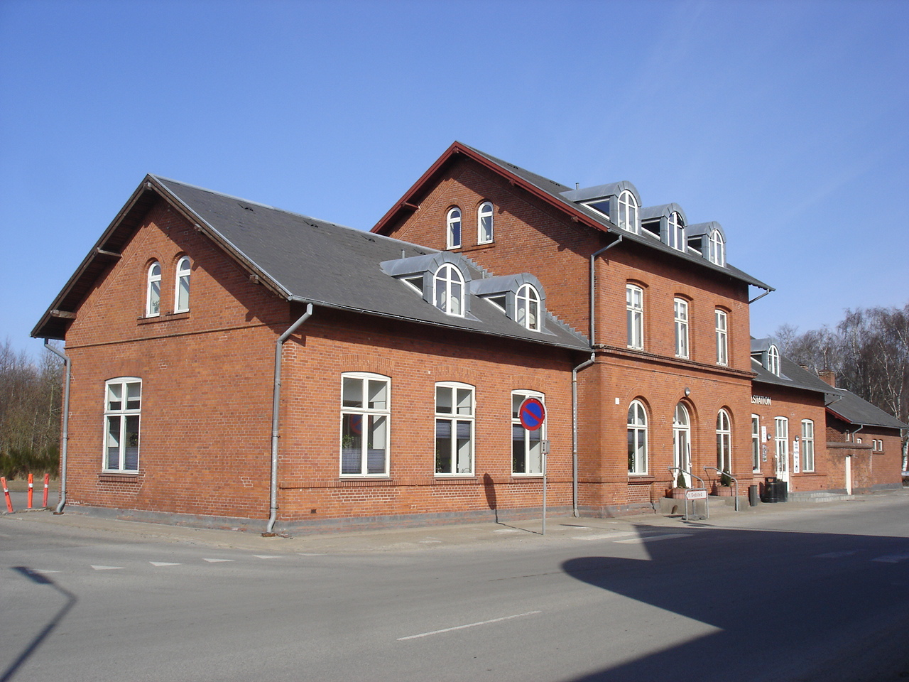 Aalestrup Station, vejsiden fra SV